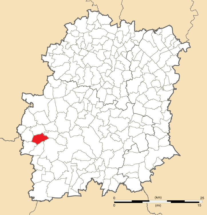 Carte de position de Plessis-Saint-Benoist en Essonne (91)